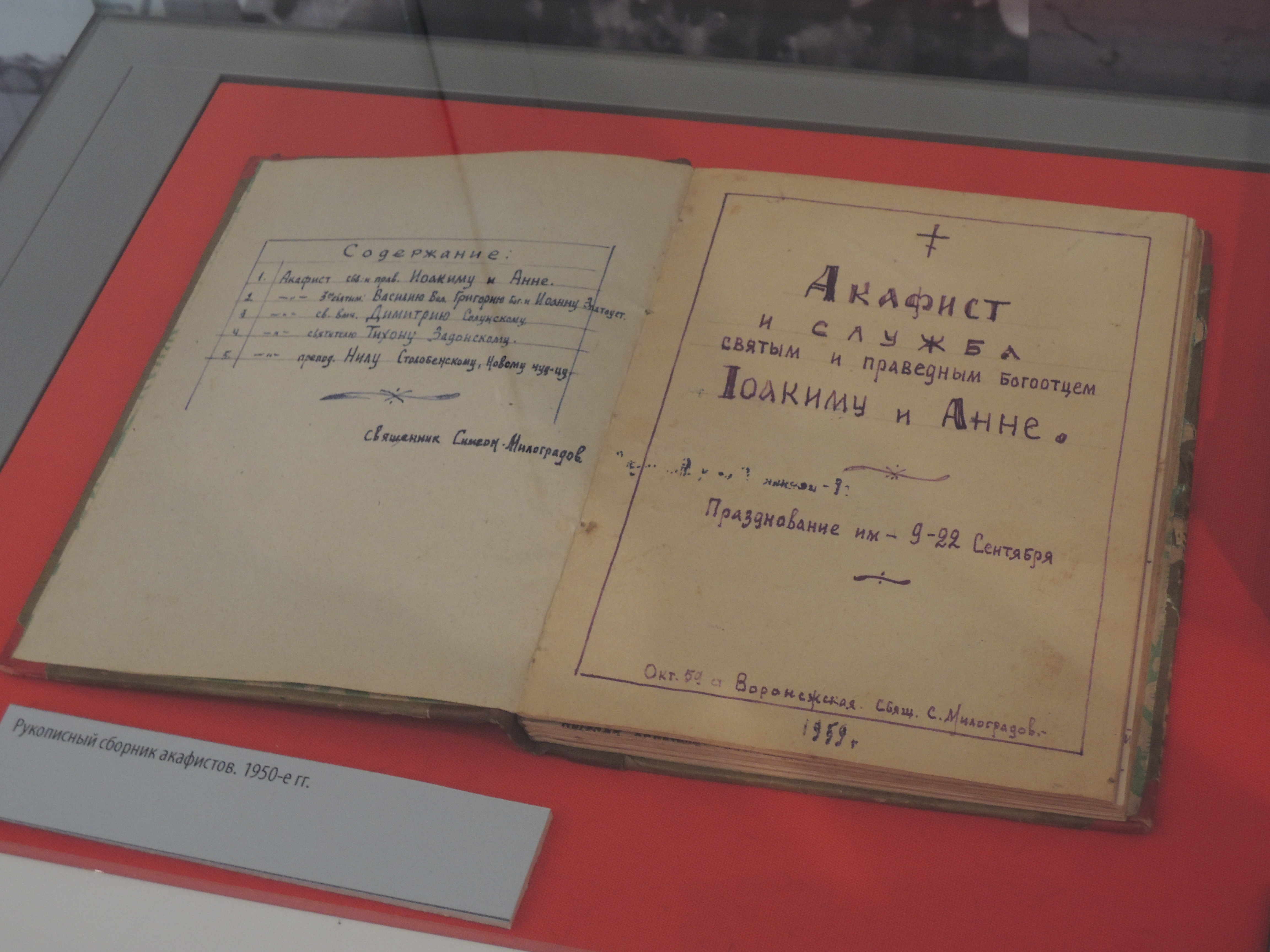 Выставка «Преодоление: Русская Церковь и Советская власть» в Государственном центральном музее современной истории России в Москве. 2012